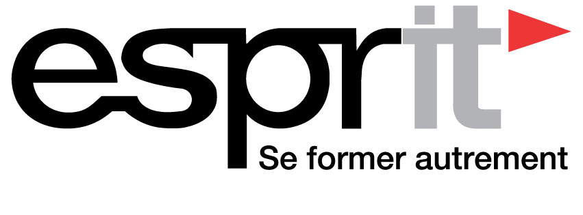 Logo officiel de l'École supérieure privée d'ingénierie et de technologie - ESPRIT